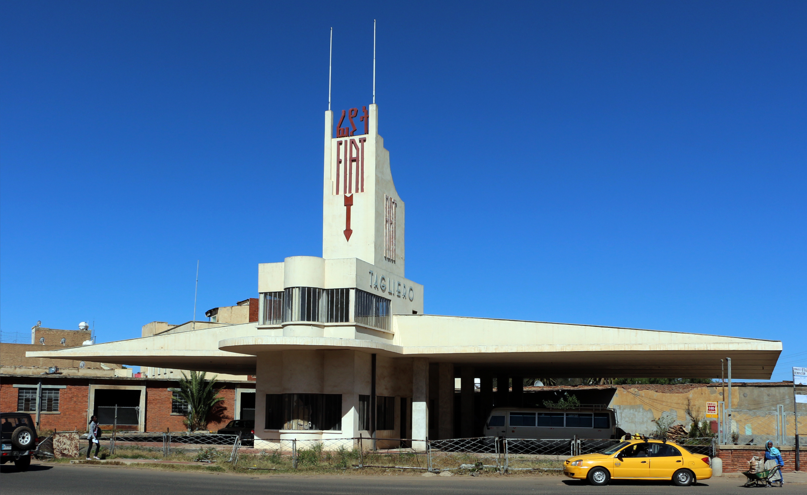 Fiat tagliero, 08.JPG